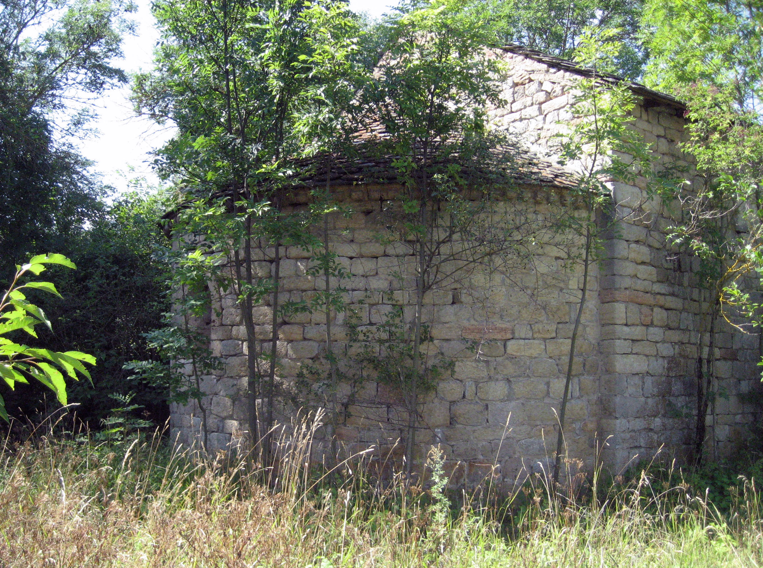 Ábside la iglesia de Sant Serni de Coborriu en la comarca catalana de la Baja Cerdaña (Spain)